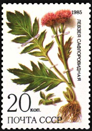 Почтовая марка СССР. Левзея сафлоровидная. Номер в каталоге ЦФА 5652